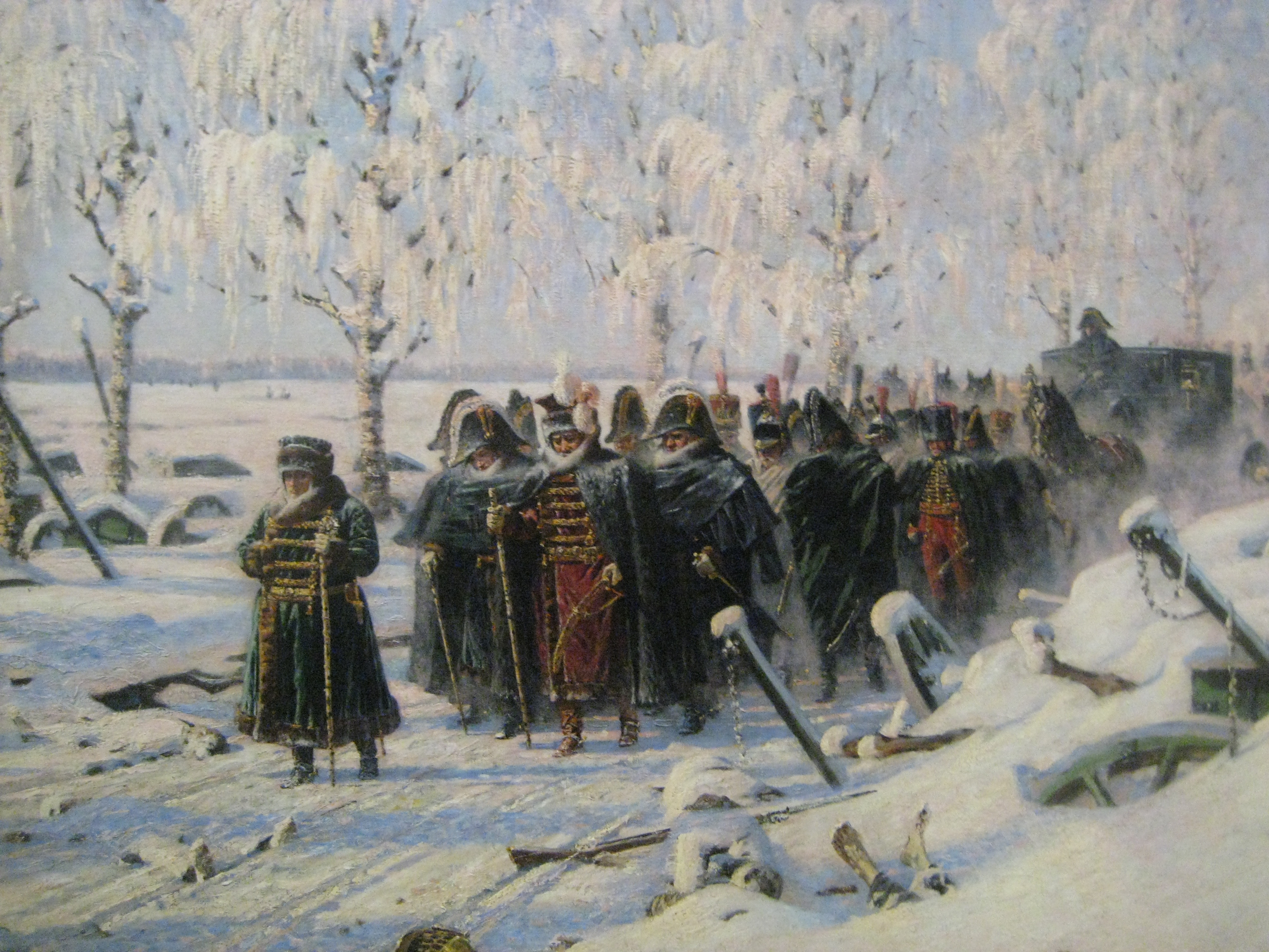 На большой дороге. Отступление, бегство